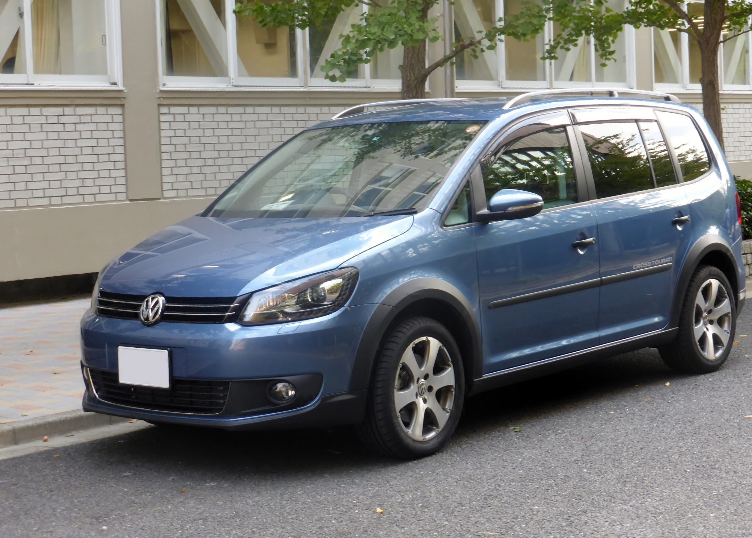 フォルクスワーゲン・クロストゥーランをフロントから撮影。